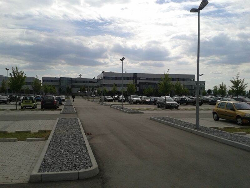 Firma Joseph Vögele AG in Ludwigshafen am Rhein, Rheingönheim